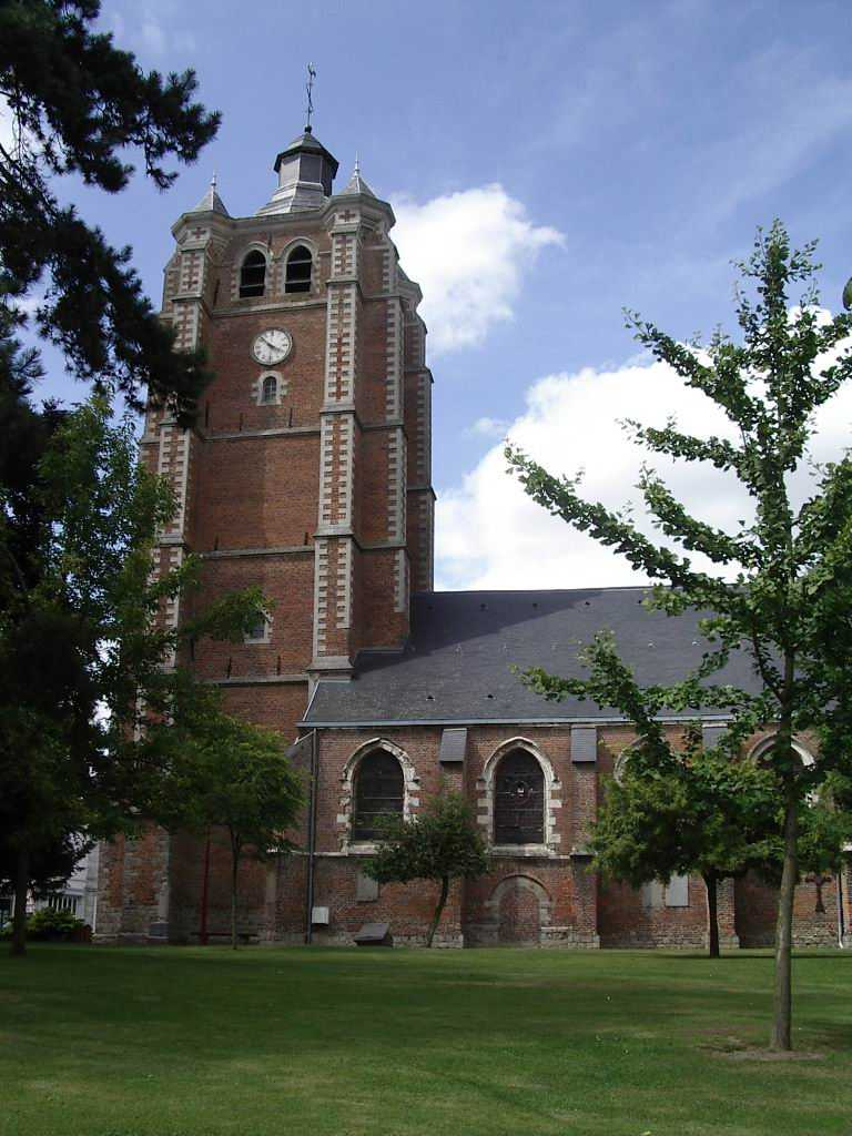 Eglise de Bersée